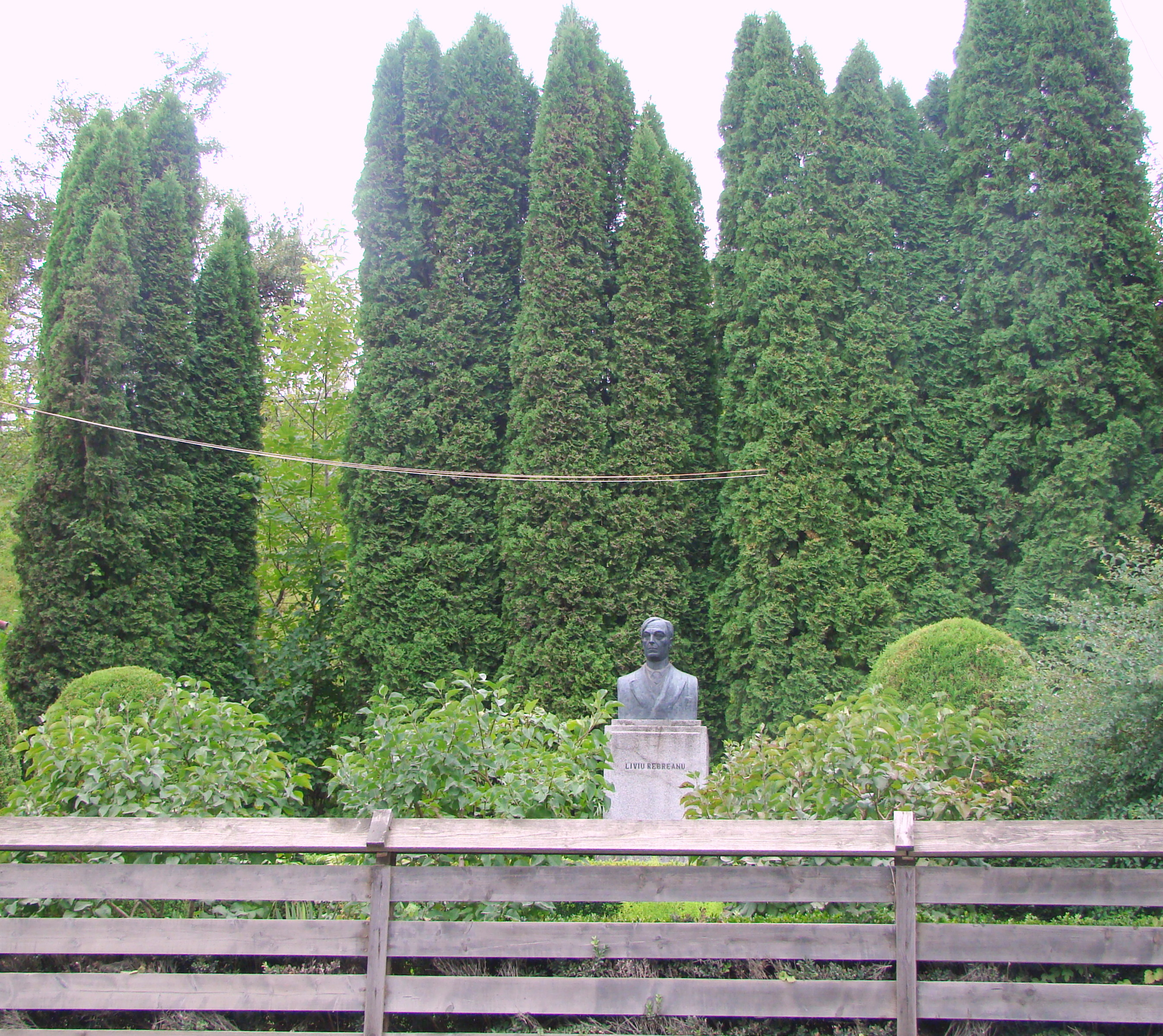 Bustul lui Liviu Rebreanu, localitate componentă Liviu Rebreanu; oraș Năsăud